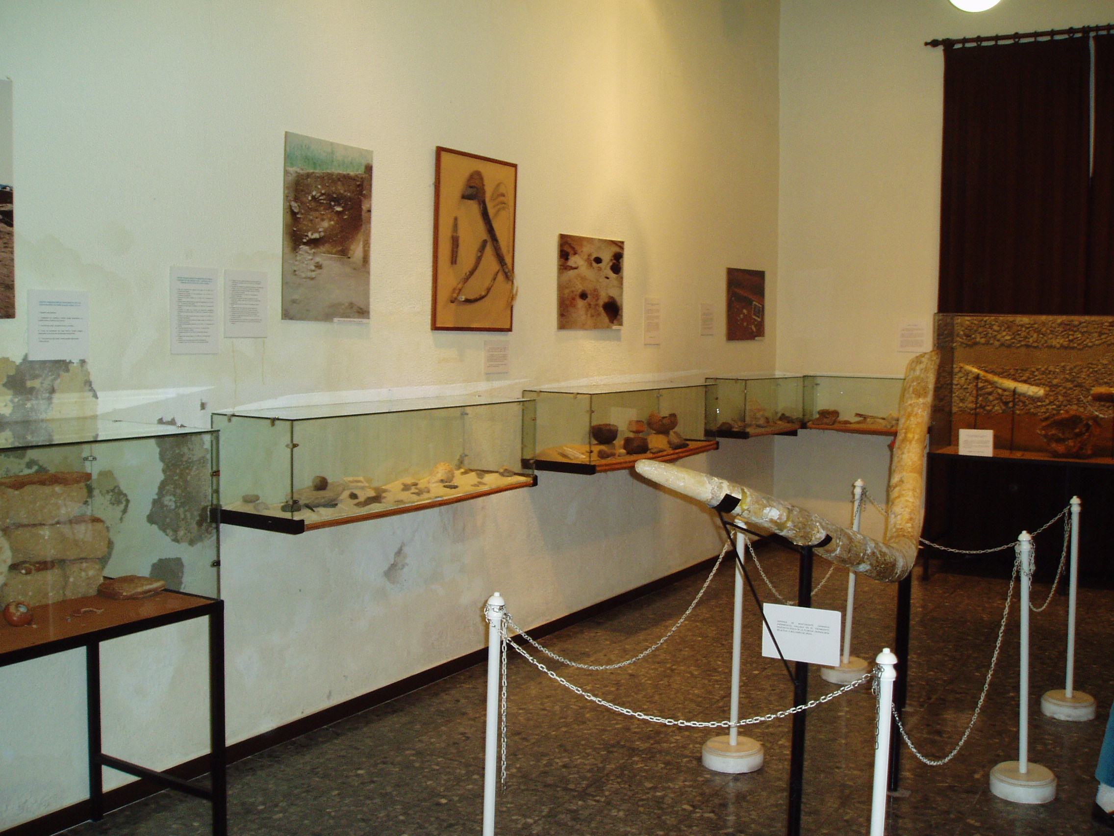 Sala de Arqueología del Museo municipal de El Puerto de Santa María, provincia de Cádiz, España.